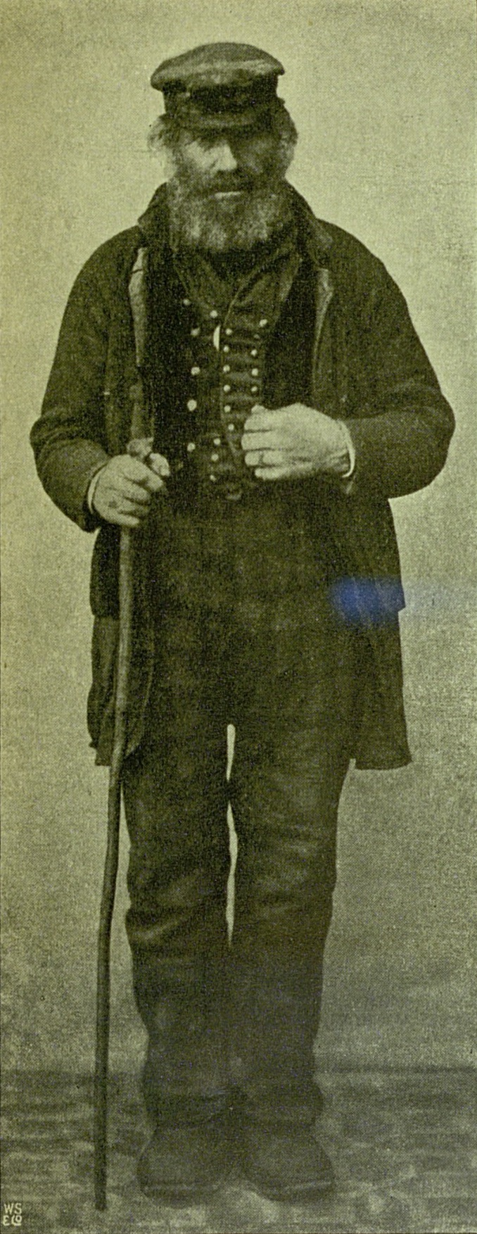 Ola Jonsson Storevik, fotografert av Marcus Selmer i Bergen, cirka 1860.